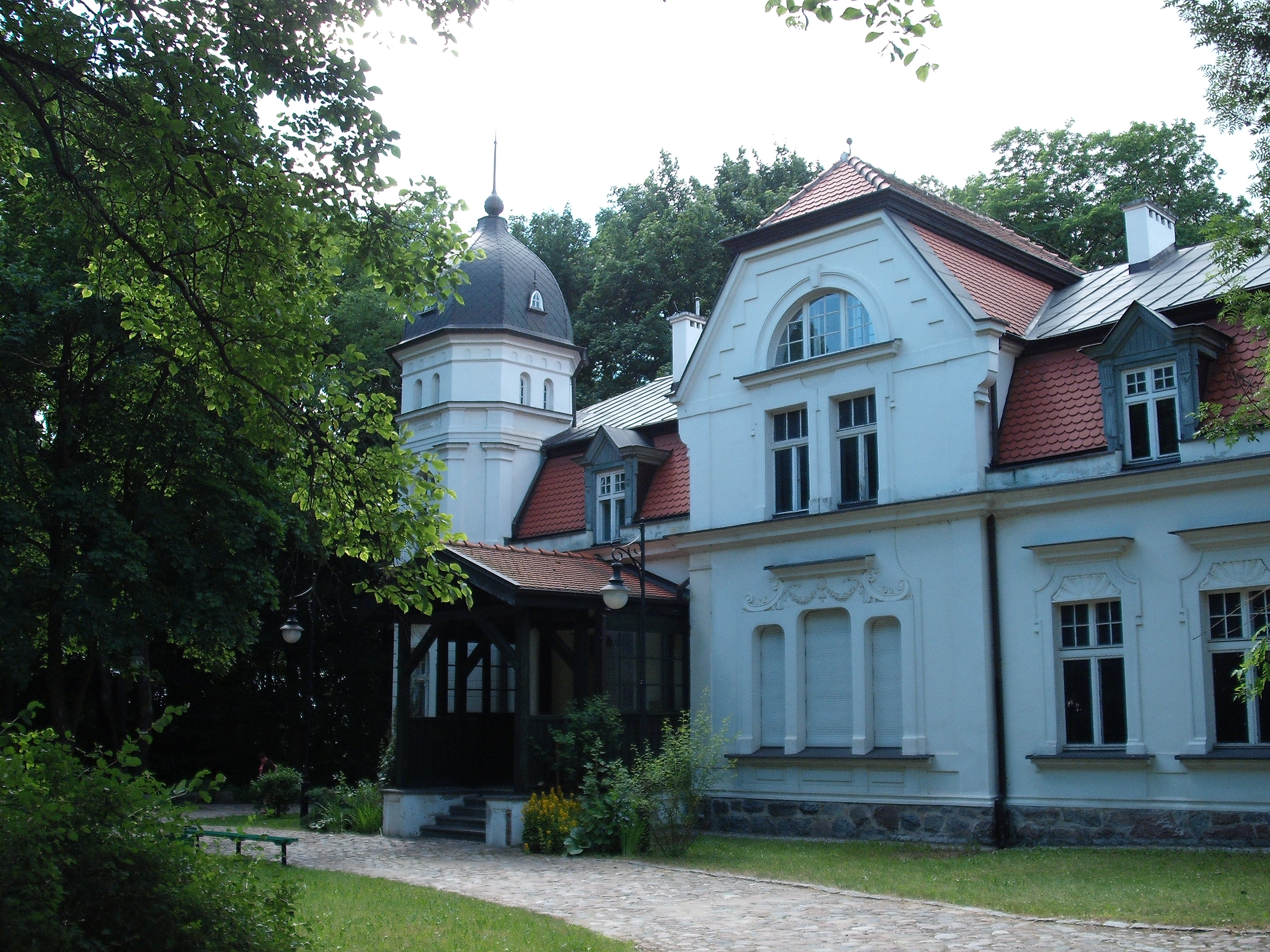 Olsztyn, ul. Metalowa 5 - pałac widok frontowy (zabytek nr A-2937)